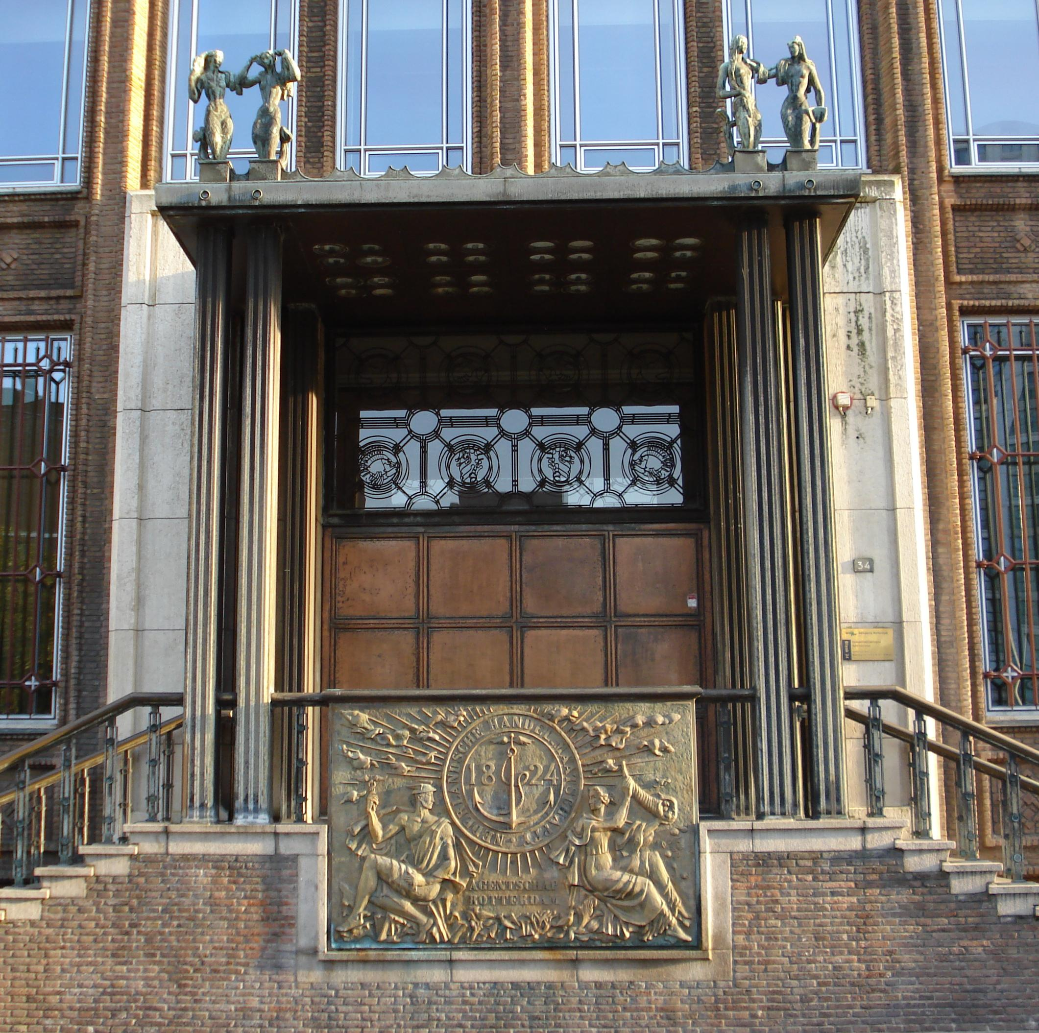 Rotterdam, Blaak34 (voorm. NHM). Bronzen embleem en 4 zeemeerminnen by Nel Klaassen (1906-1989) in Rotterdam/The Netherlands.